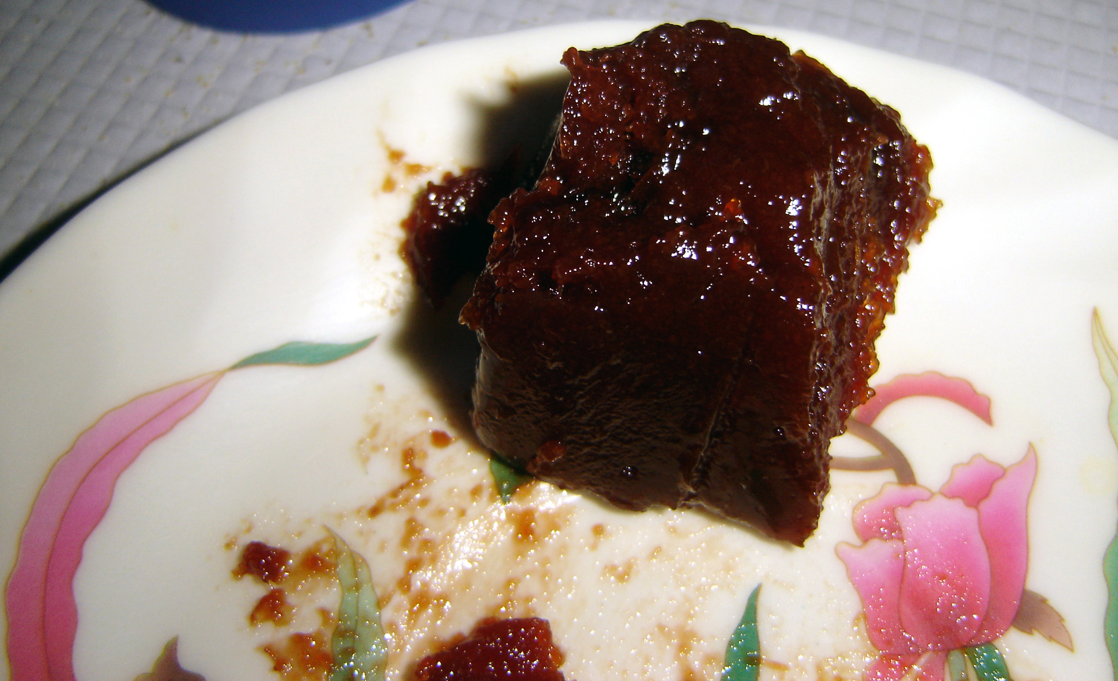 goiabada